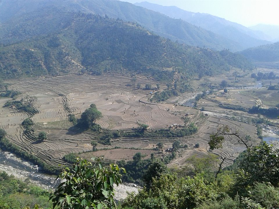 नेपाली: Bharad Sain Khet Dadeldhura